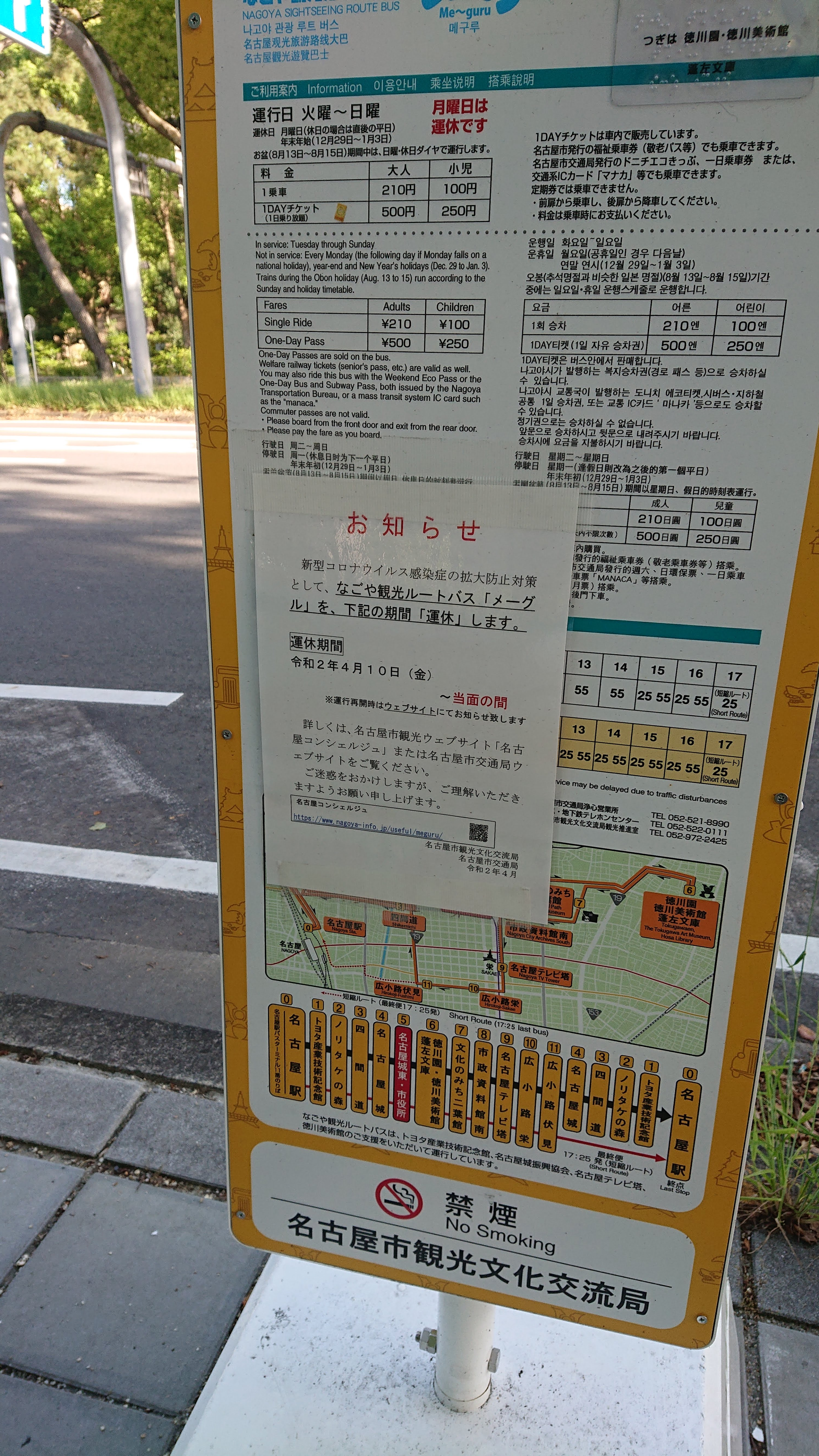 メーグル 休止 お知らせ